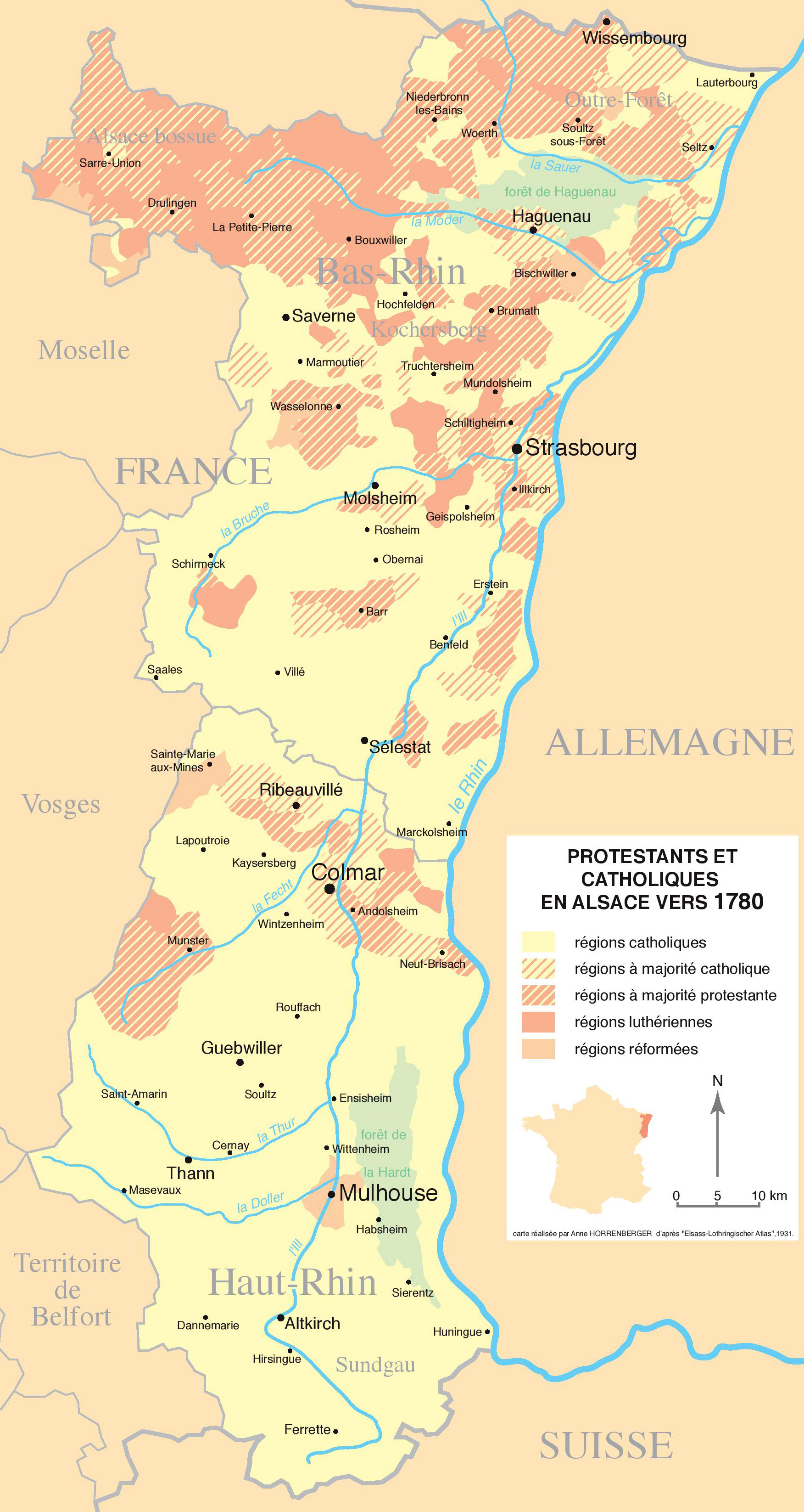 Protestants et catholiques en Alsace vers 1780. Carte réalisée par Anne Horrenberger.